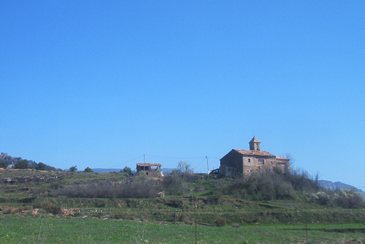 Capolat, Berguedà